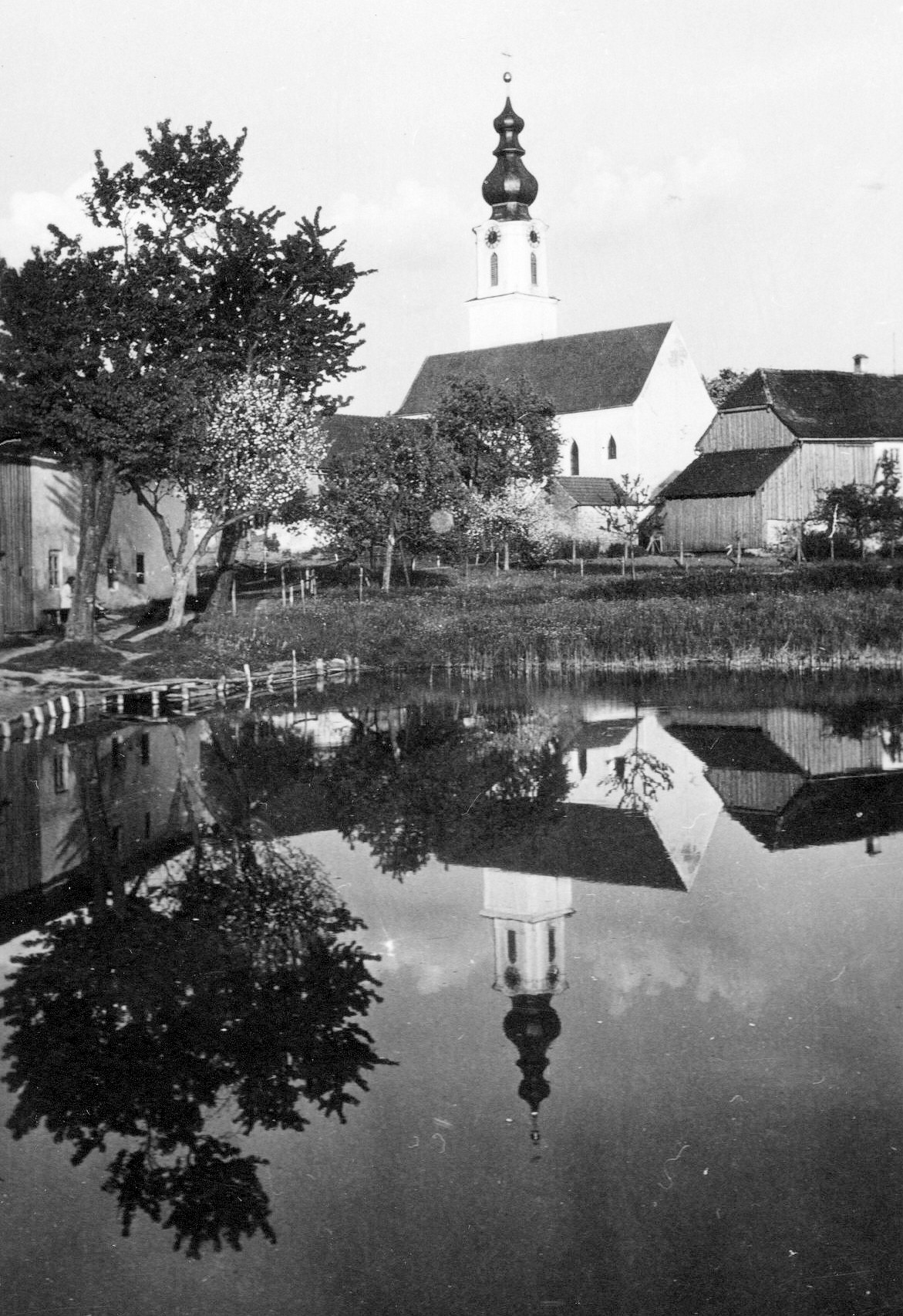 Haunzenbergersöll 1956 Kirche Pfarrkirche St. Johannes der Täufer Dorf Weiher Wirtsweiher Spiegelbild